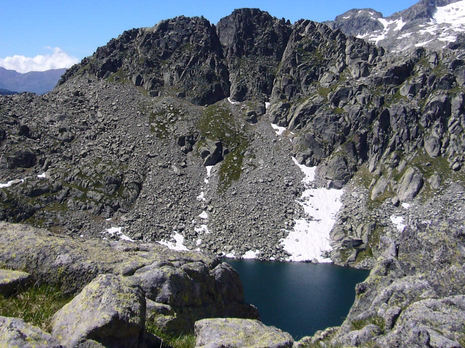 Tuc de Roques Negres, vist des del nord-est de l'Estany de Tumeneia de Baix; la Vall de Boí, Alta Ribagorça, Catalunya